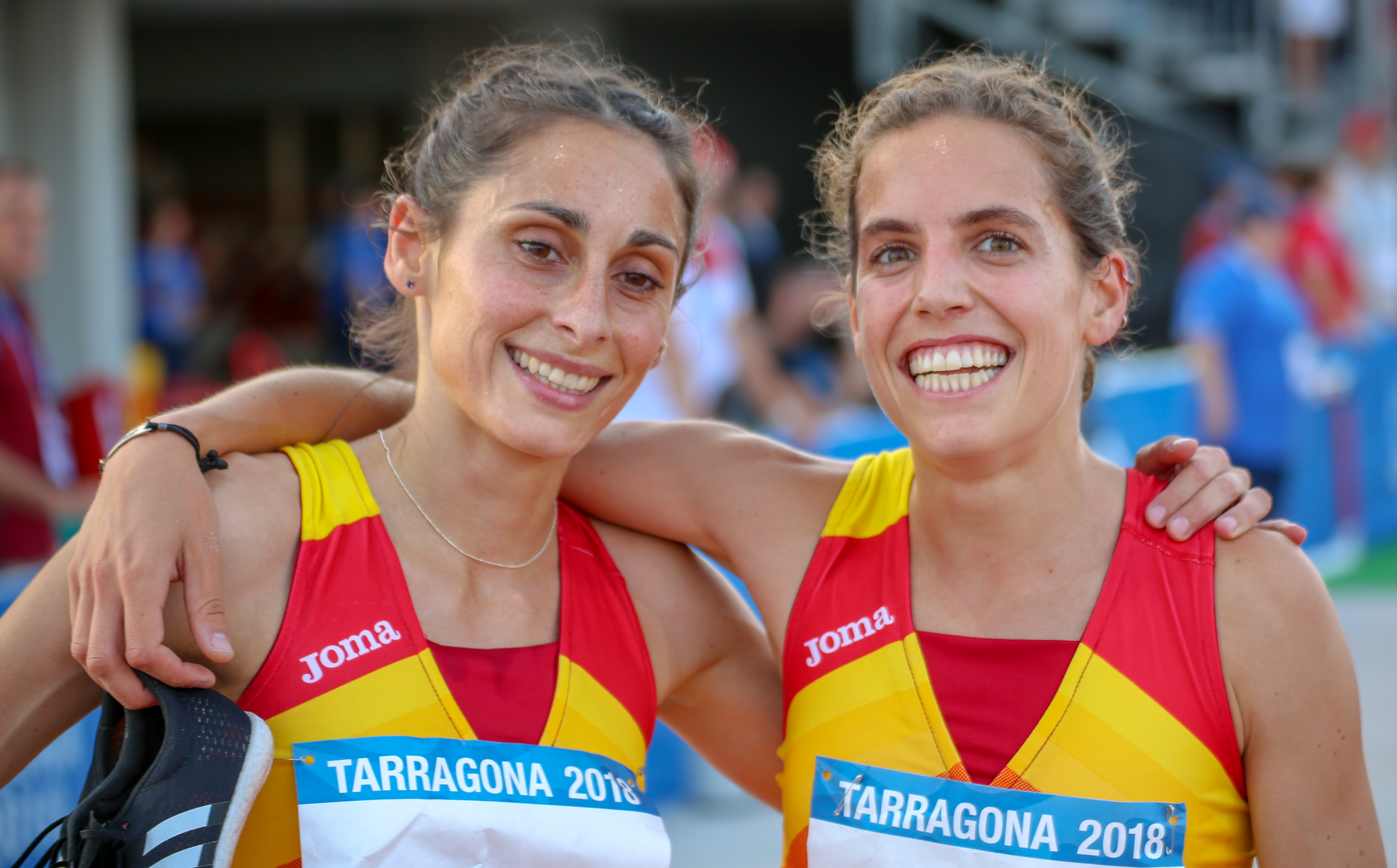 Marta Pérez y Solange Pereira en los Juegos del Mediterráneo 2018